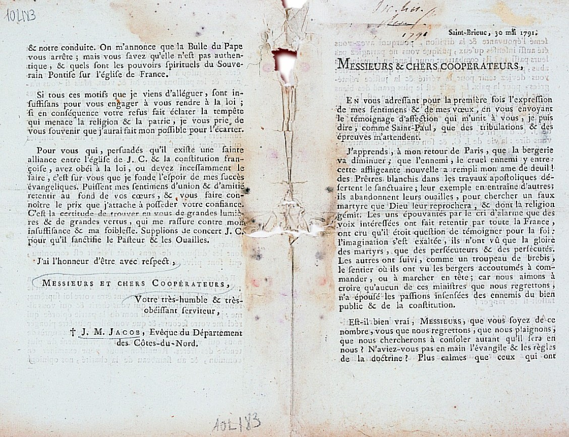 Zivilkonstitutioun vum Klerus - « Constitution civile du Clergé, adresse de Mgr Jacob, évêque de Saint-Brieuc », 30. Mee 1791 (Archives Départementales des Côtes-d'Armor, 10 L 183).